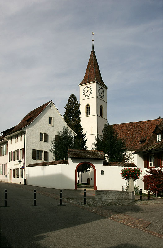 Kirche in Sissach